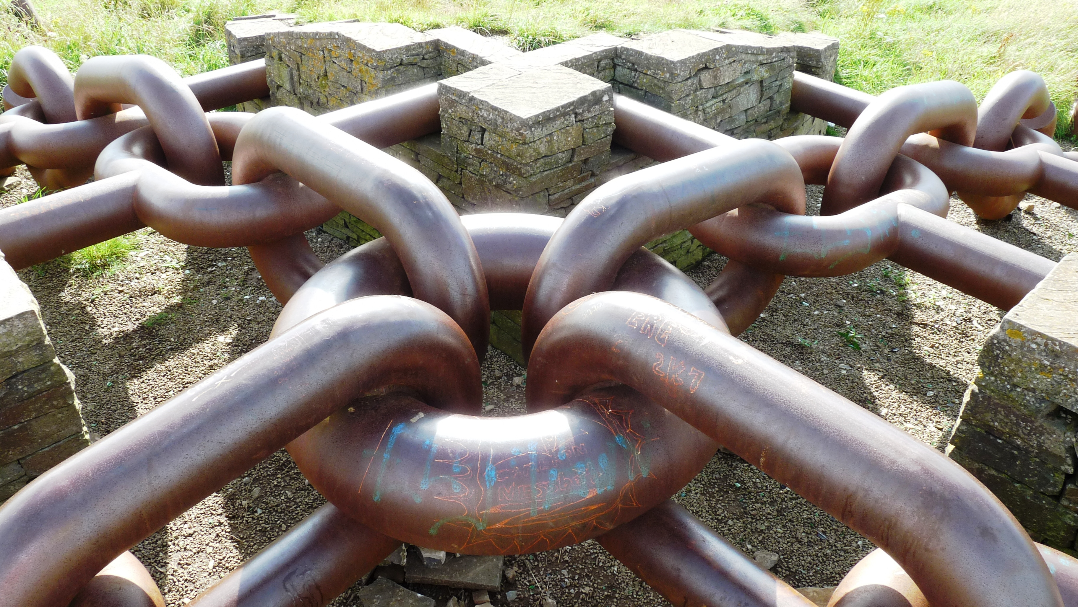 Grangemoor park